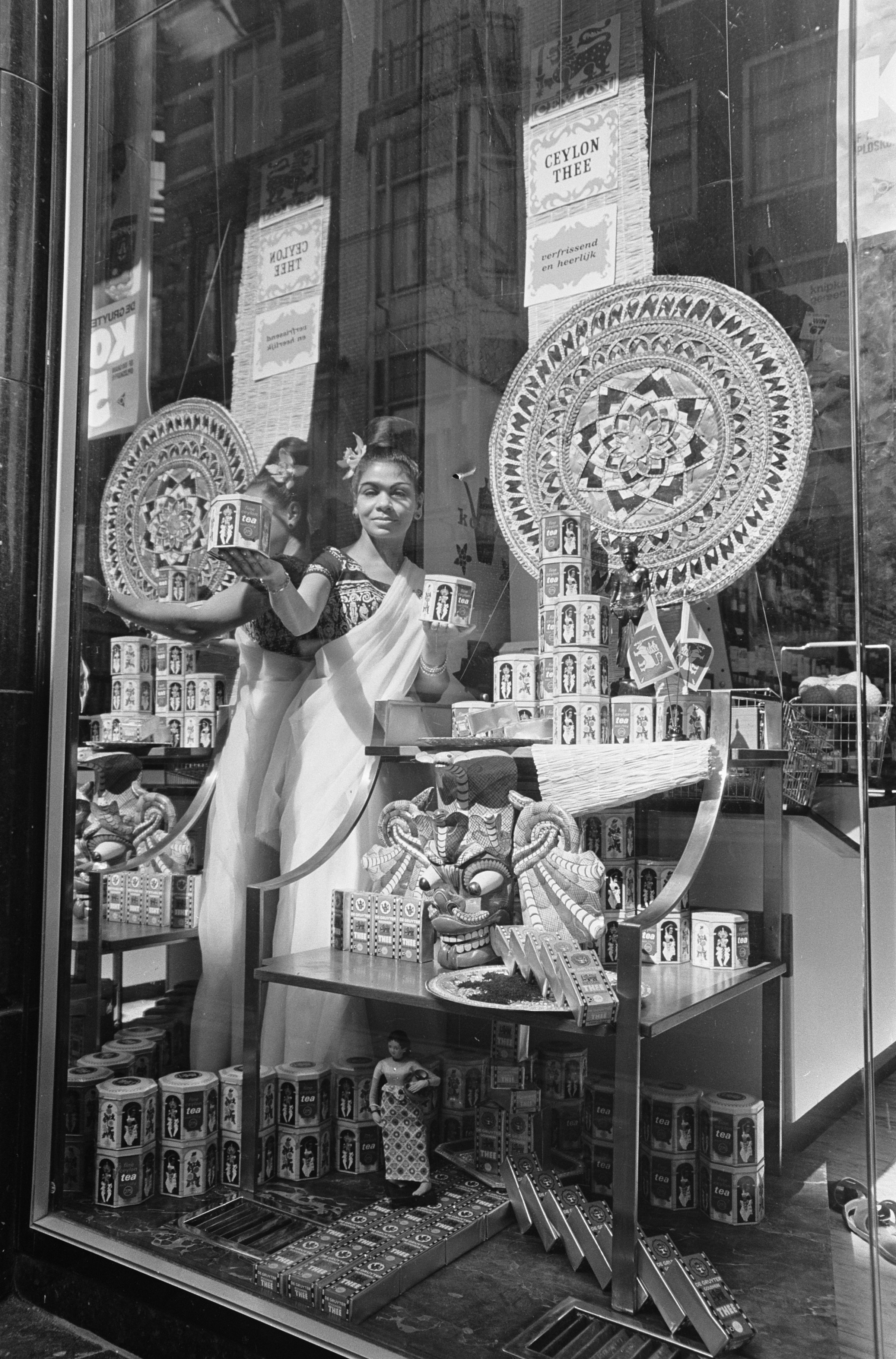 Collectie / Archief : Fotocollectie Anefo Reportage / Serie : [ onbekend ] Beschrijving : Opdracht De Gruyter , Ceylon-thee Datum : 21 april 1967 Instellingsnaam : De Gruyter Fotograaf : Nijs, Jac. de / Anefo Auteursrechthebbende : Nationaal Archief Materiaalsoort : Negatief (zwart/wit) Nummer archiefinventaris : bekijk toegang 2.24.01.05 Bestanddeelnummer : 920-2528